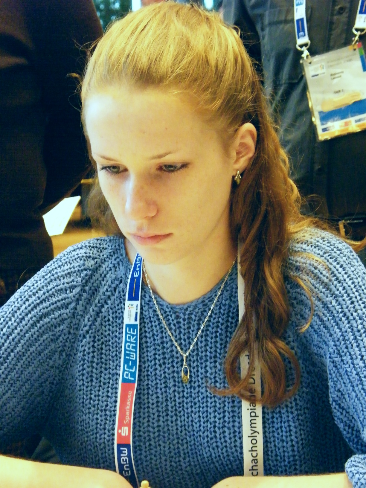 Valentina Golubenko bei der 38. Schacholympiade in Dresden 2008